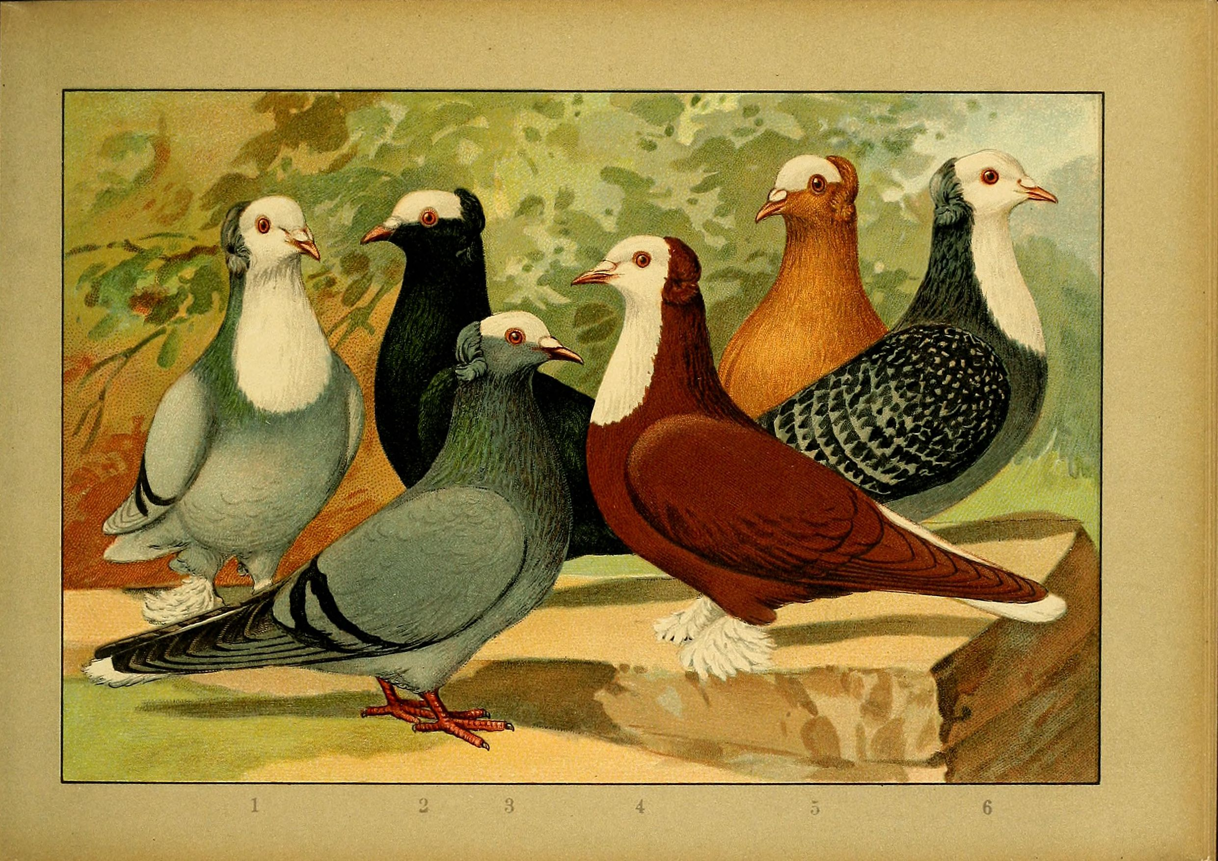 Thüringer Weißlatz (→ Category:Thuringian White Bib) Mäusertaube (→ Category:Thuringian Mauser Pigeon) Mäusertaube Thüringer Weißlatz Mäusertaube Thüringer Weißlatz